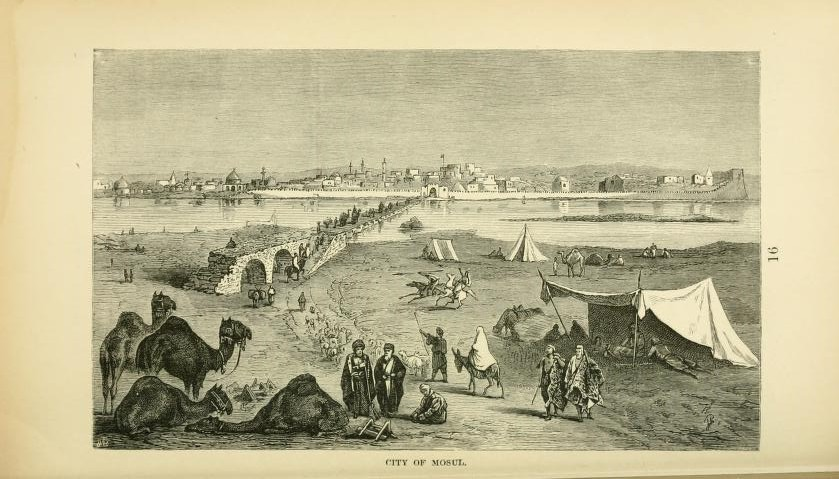 Die Stadt Mosul in Assyrien Mitte des 19. Jahrh.